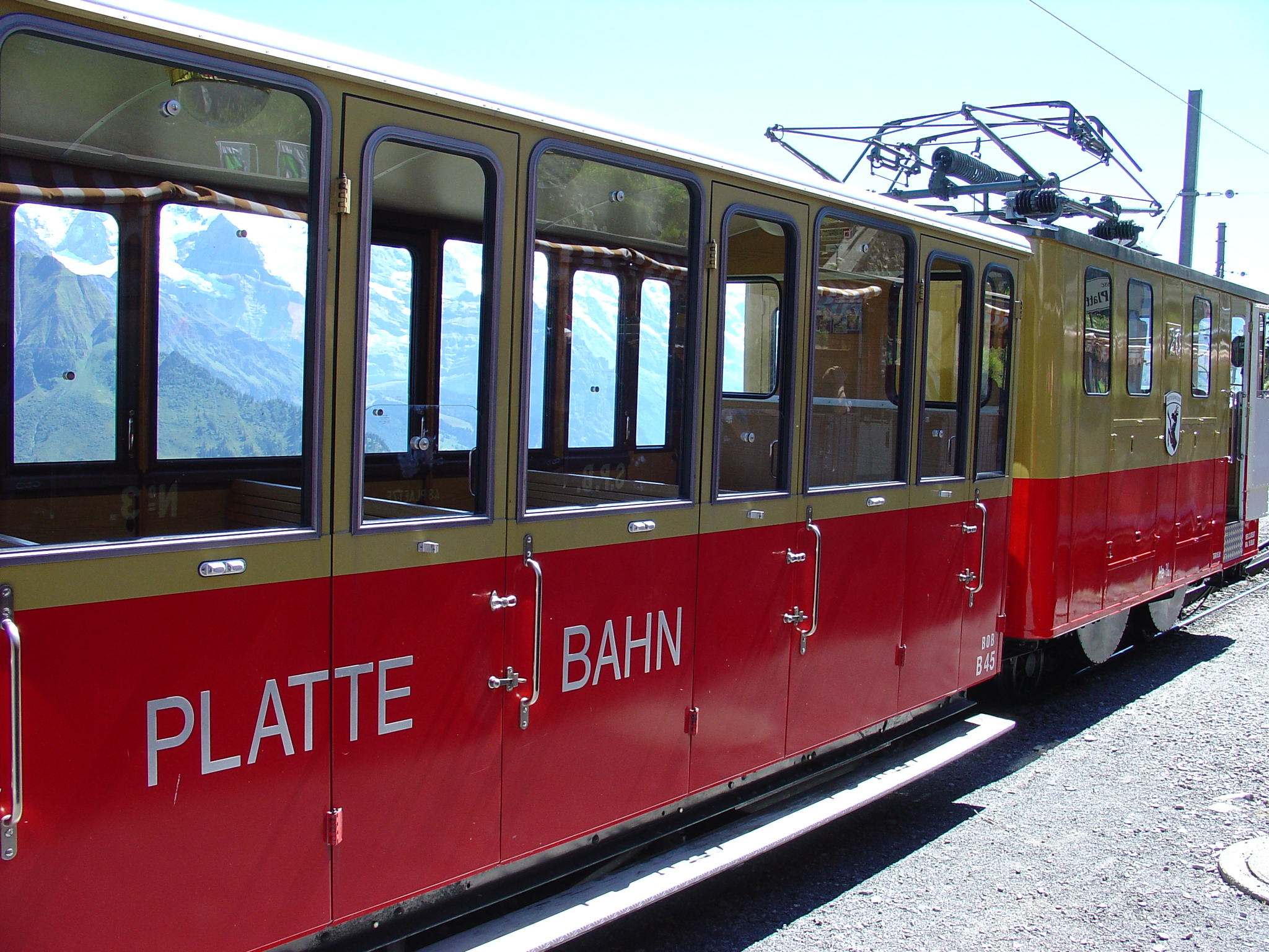 Schynige Platte-Bahn, train at Schynige Platte Station